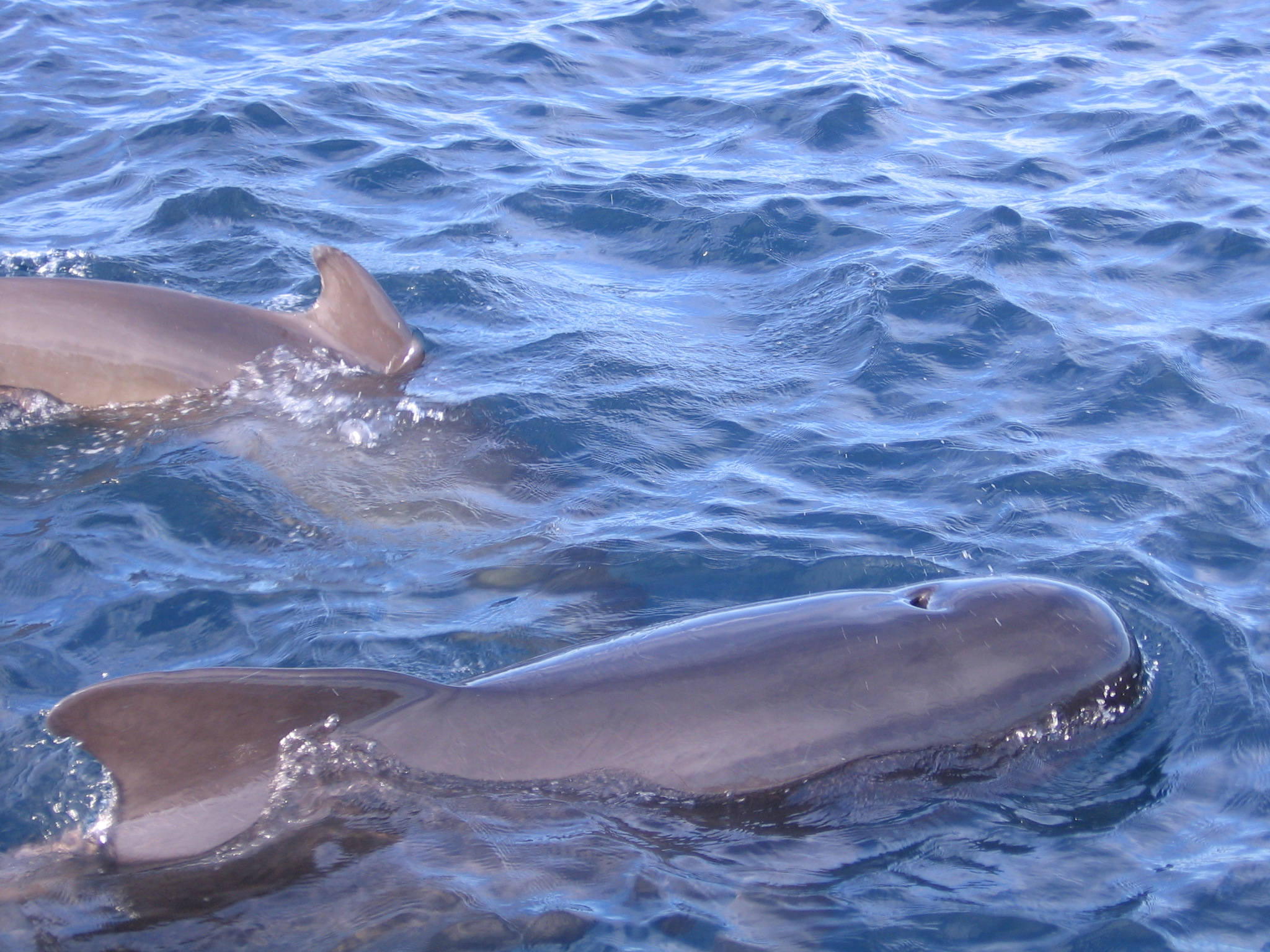 Globicephala melas en el Estrecho de Gibraltar